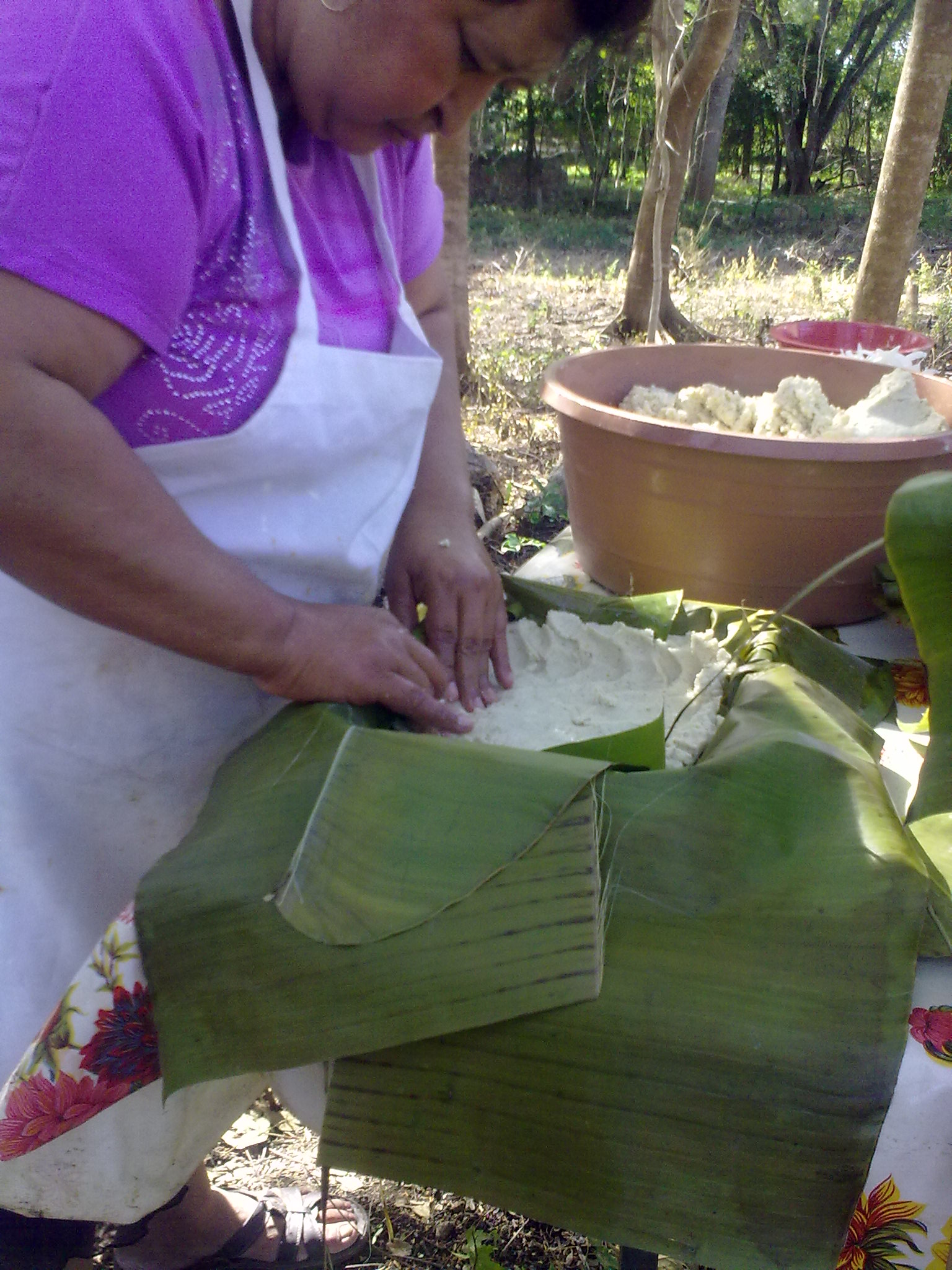 como se forran los moldes